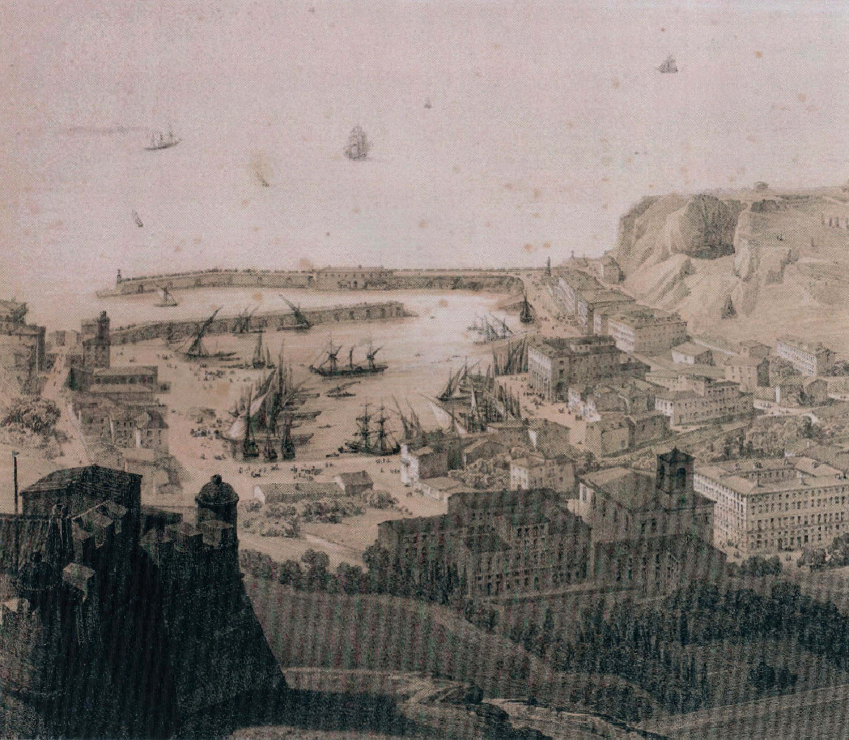 Gravure du port de nice depuis le Mt Alban.